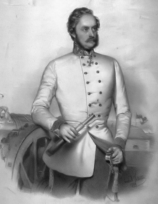 Christian Leiningen-Westerburg vezérőrnagy. Eduard Kaiser litográfiája (1849)